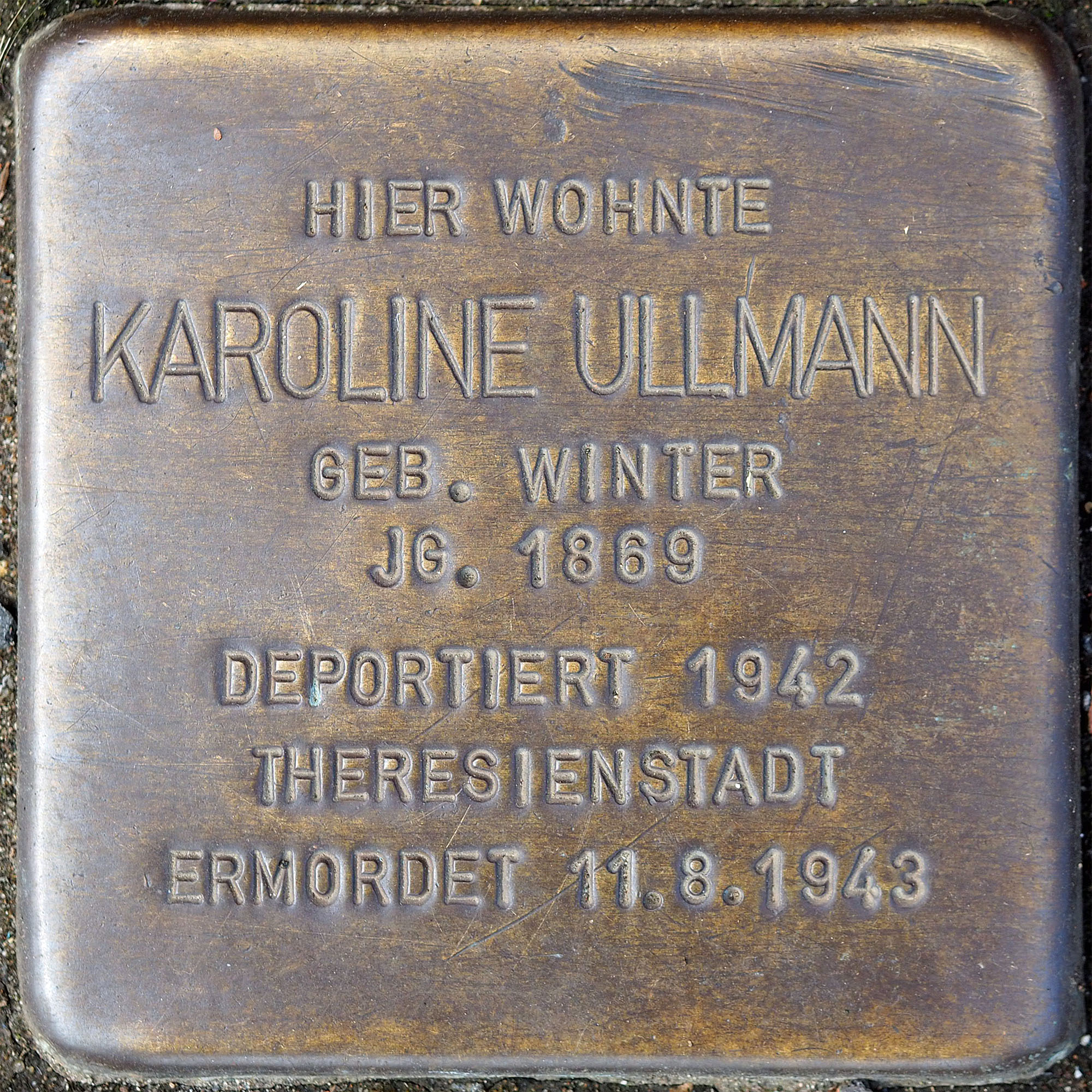 Stolpersteine Korschenbroich: Ullmann, Karoline